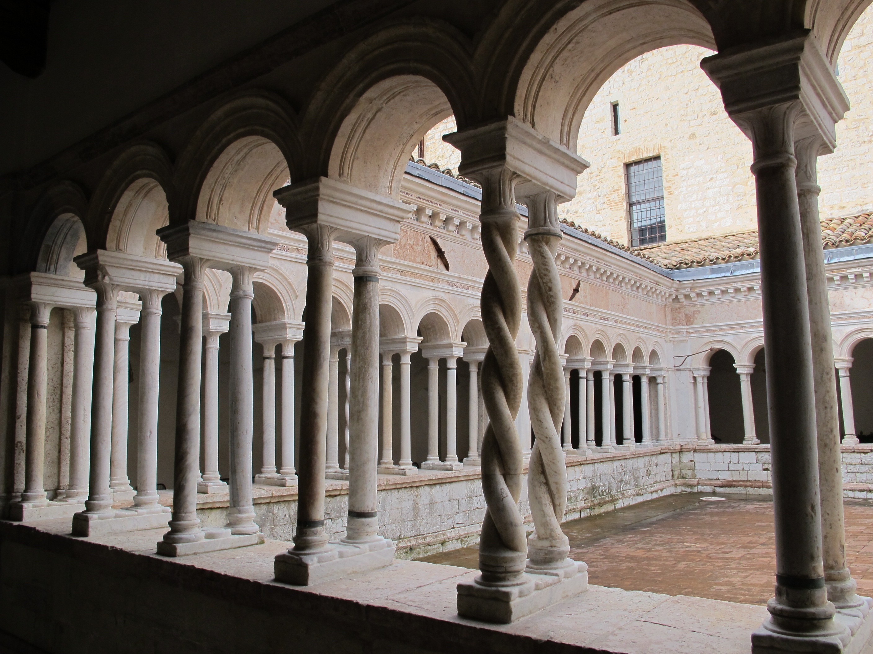 Abbazia di sassovivo, chiostro